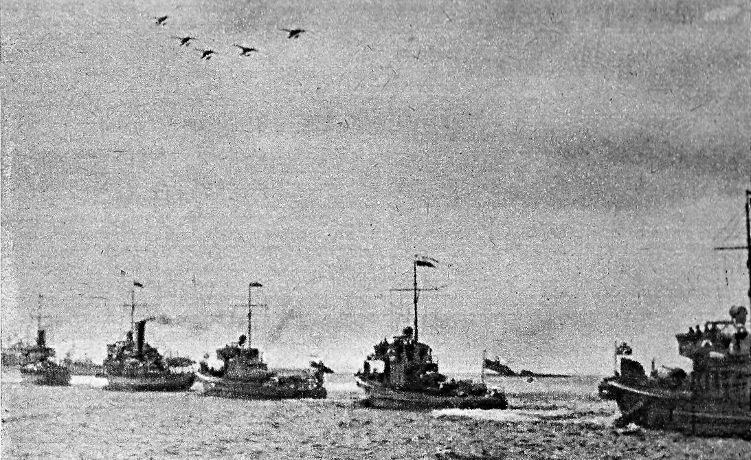 Wodnopłatowce Lublin R-13 podczas manewrów.